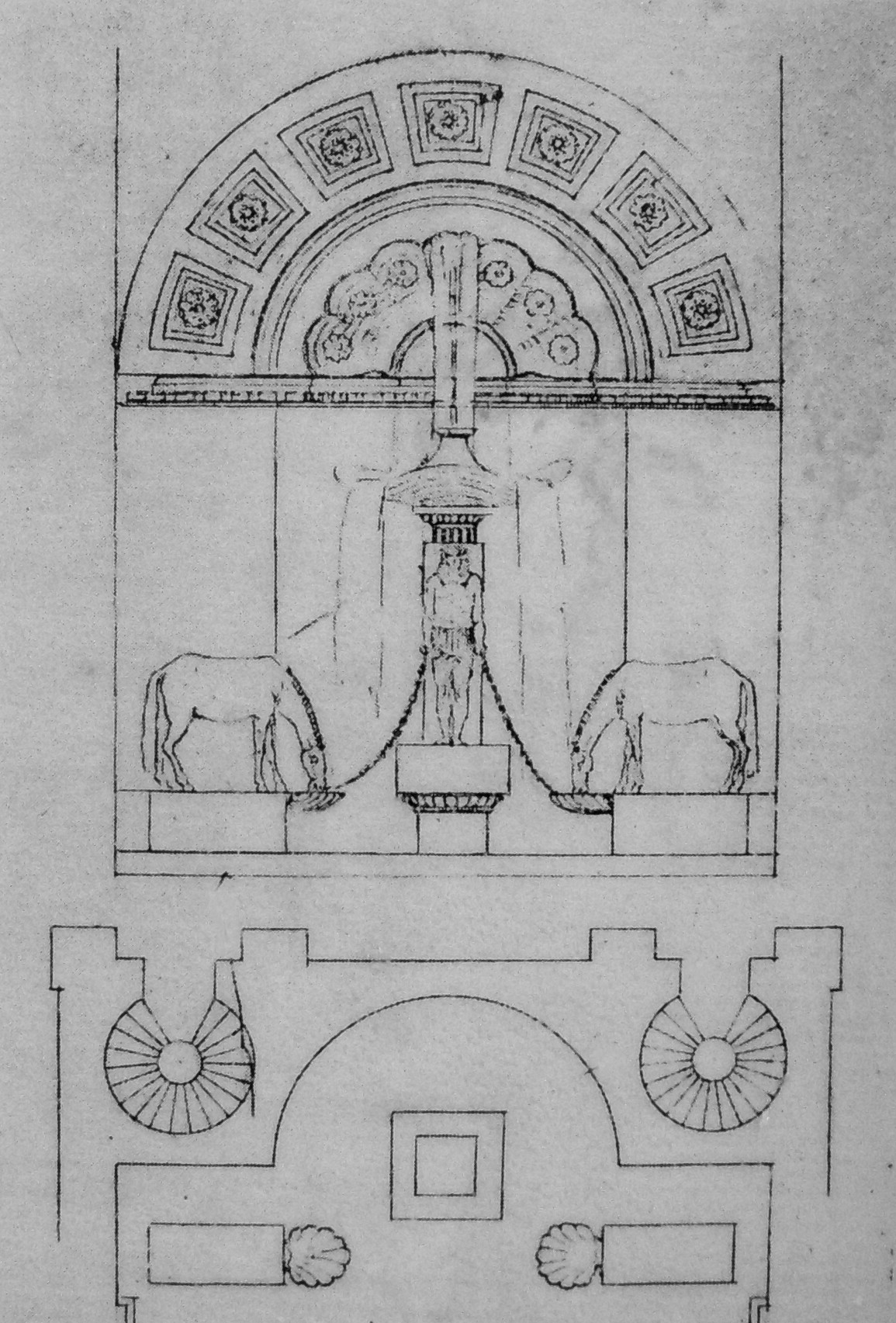 Ritning för "Stora stallet" i Hagaparken (sektion och del av plan)